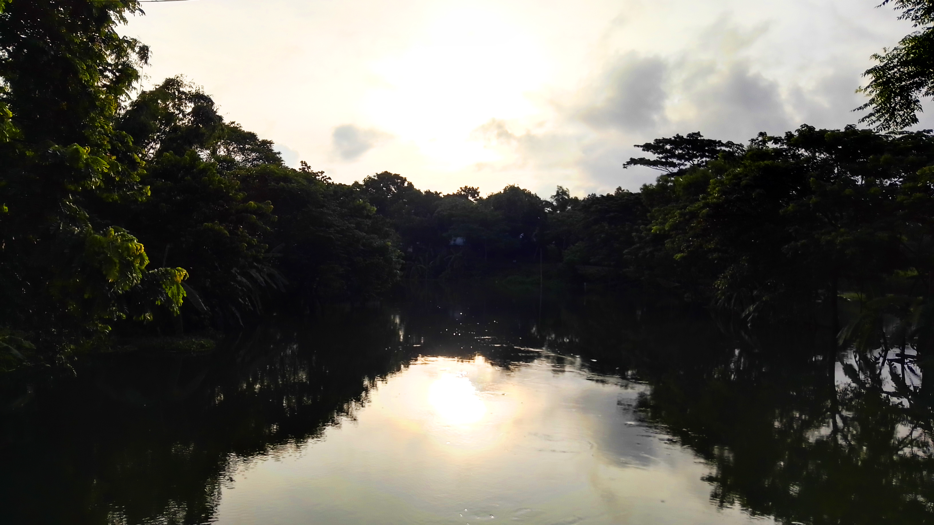 নরসুন্দা নদীর ছবি। আলোকচিত্র : আহমেদ আলী শাহ্ শাওন।